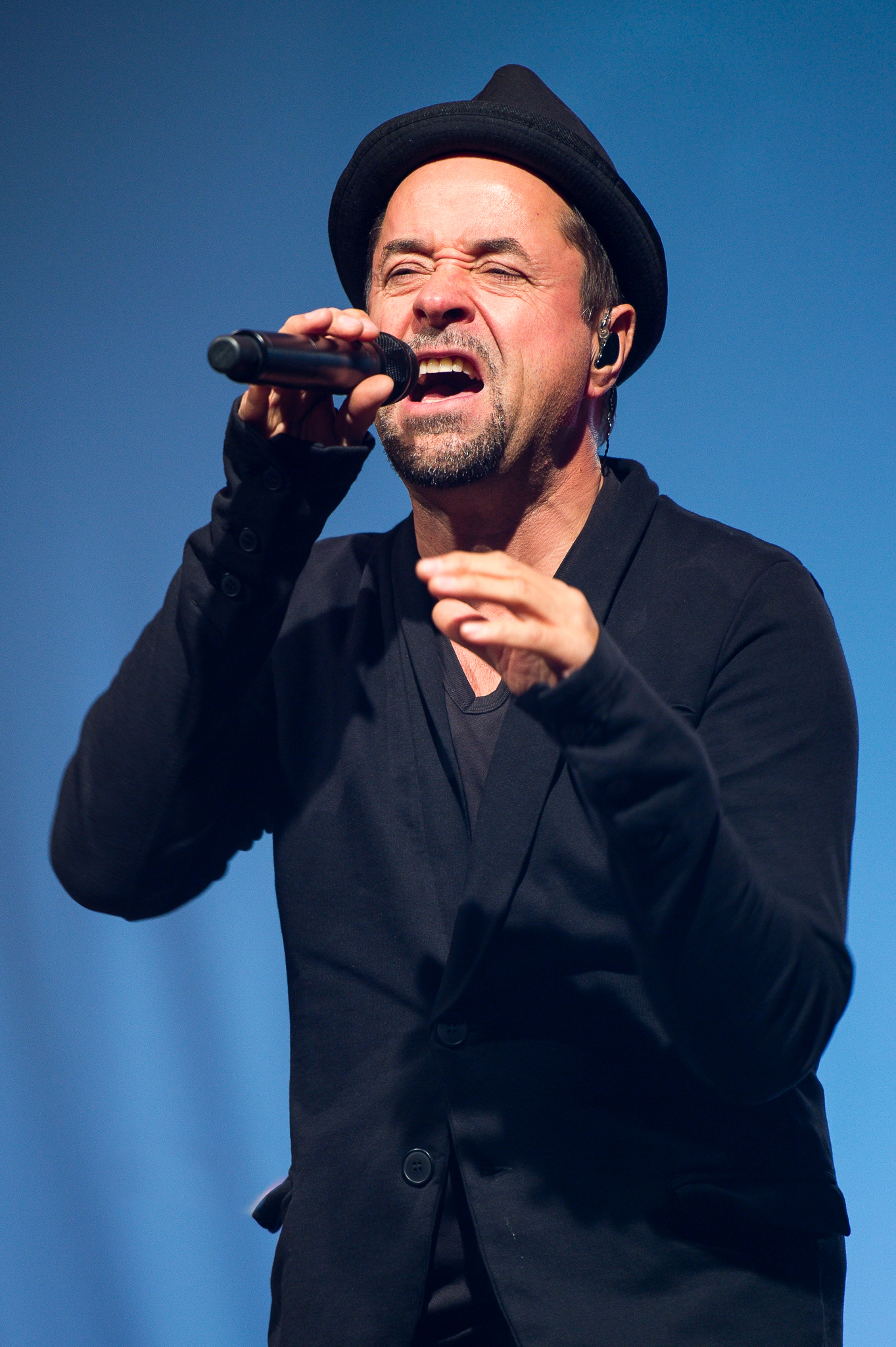 Concertbüro Franken,Konzert,Livekonzert,Livemusik,Musik,Radio Doria mit Jan Josef Liefers,Serenadenhof